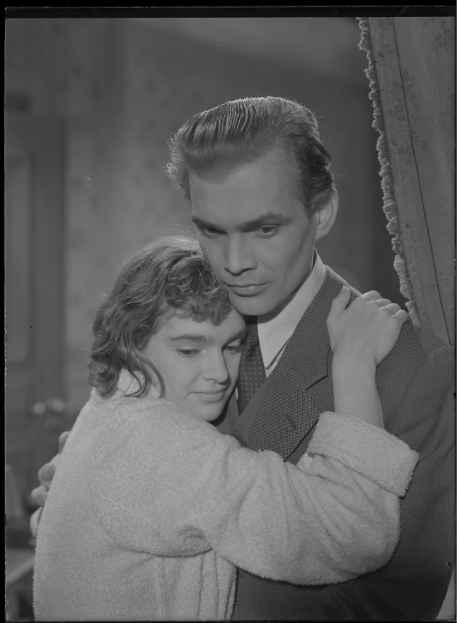 Eva Henning och Birger Malmsten i "Törst".